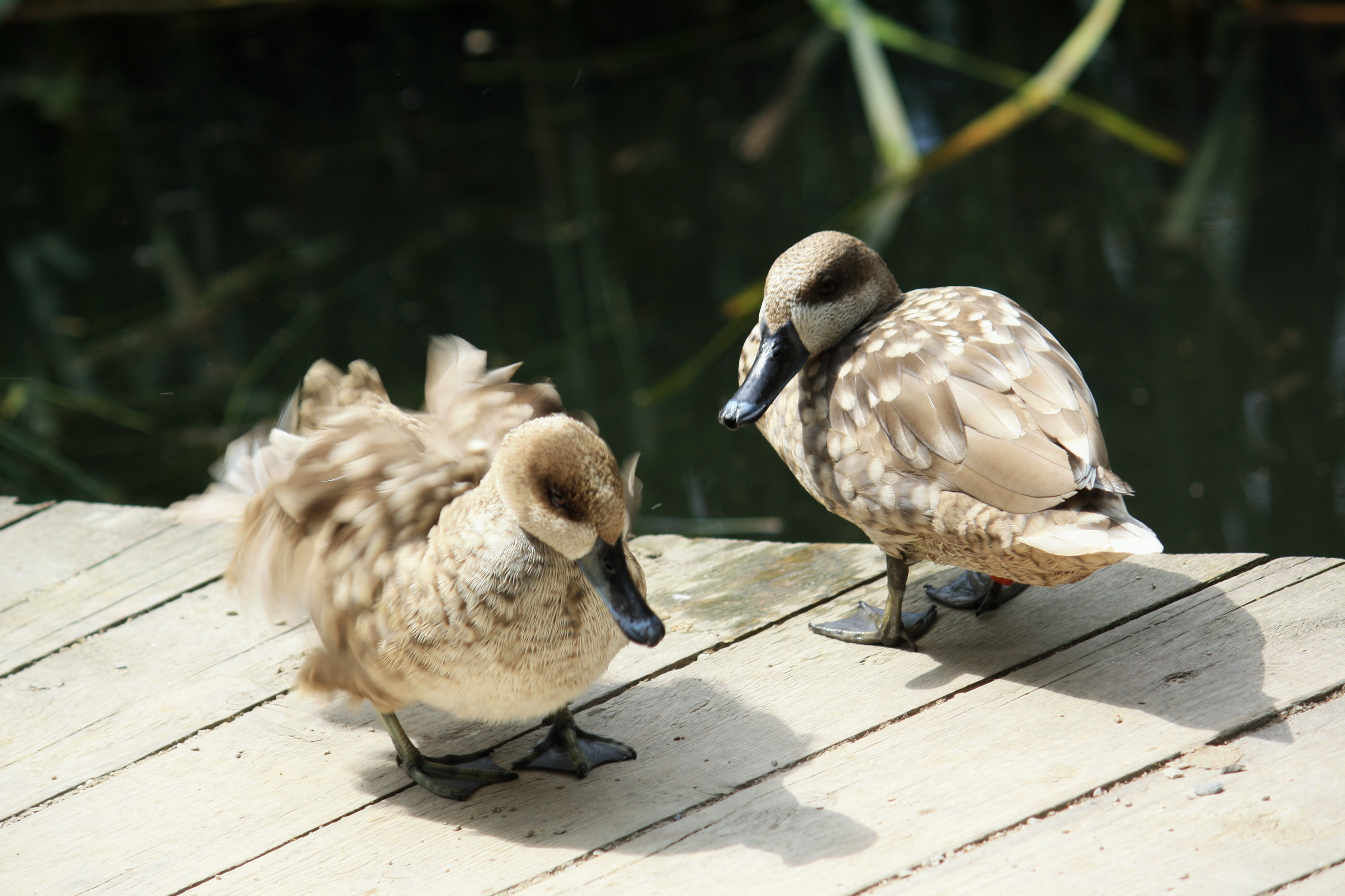 Čírka úzkozobá v Pražské Zoo